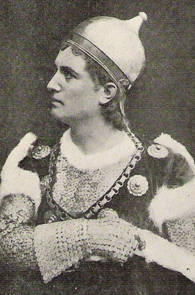 Fotografi af komponisten operasangeren Vilhelm Herold (19. marts 1865 i Hasle (Bornholm) - 15. december 1937 i København) som Oluf i Axel Grandjeans opera af samme navn 1894Dansk: Composer and opera singer Vilhelm Herold (1865-1937) as Oluf in Axel Grandjean's opera with the same name in 1894